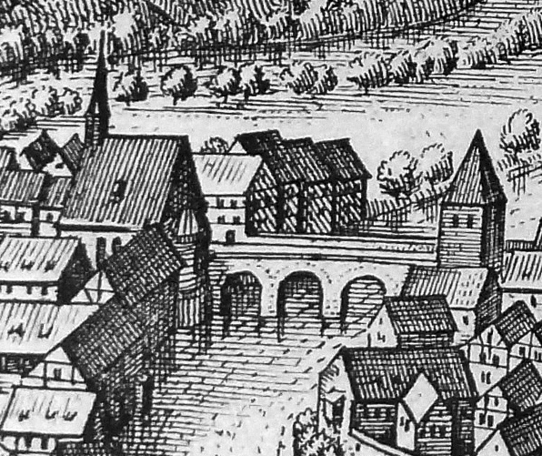 Heilig-Geist-Spital und Spitalbrücke in Eichstätt 1627. Ausschnitt aus der Stadtansicht von Matthäus Merian. (Ausschnitt aus einer Fotografie eines Reprints in der Willibaldsburg)